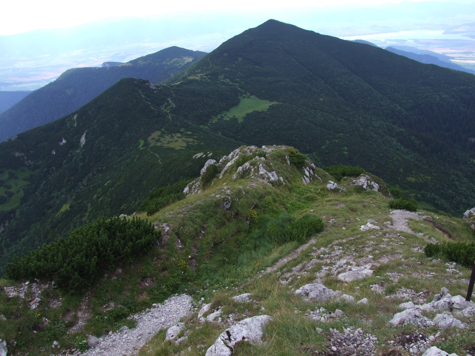 Ostra i Mała Ostra. Widok z Siwego Wierchu